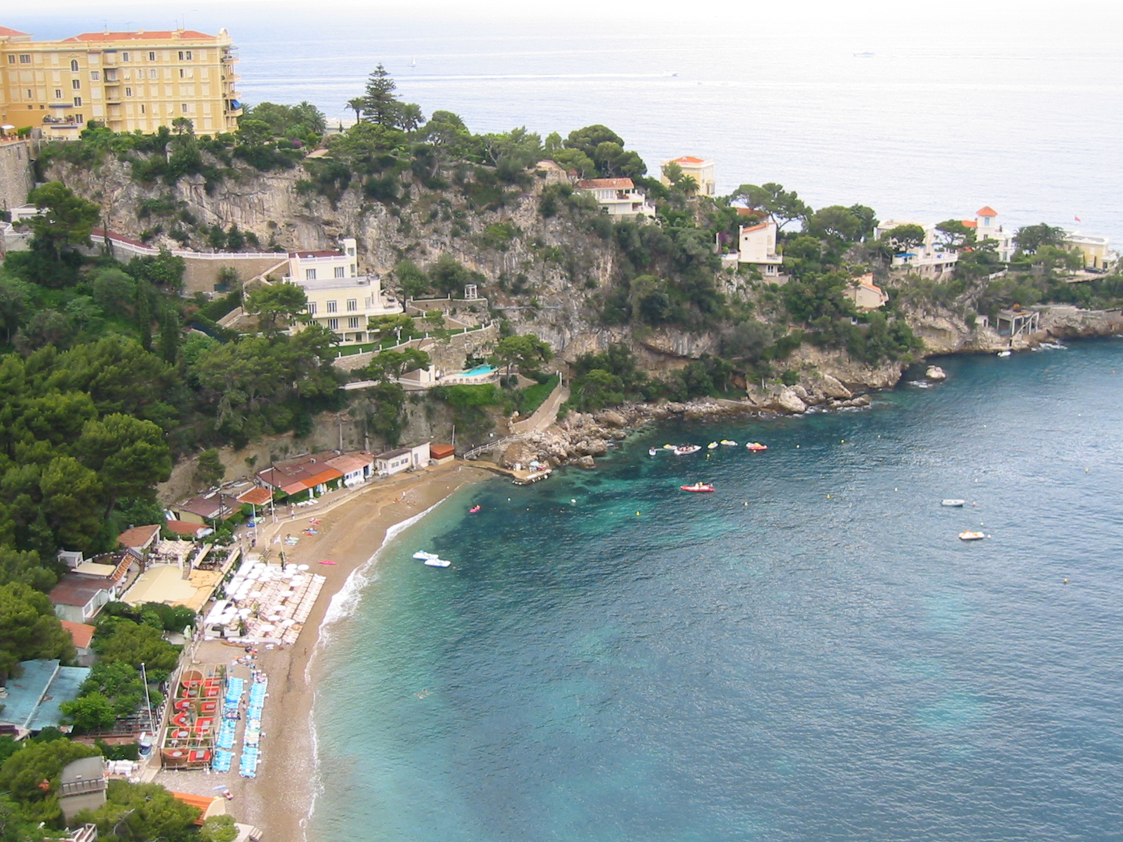 La plage Mala à cap d'Ail sur la côte d'Azur.